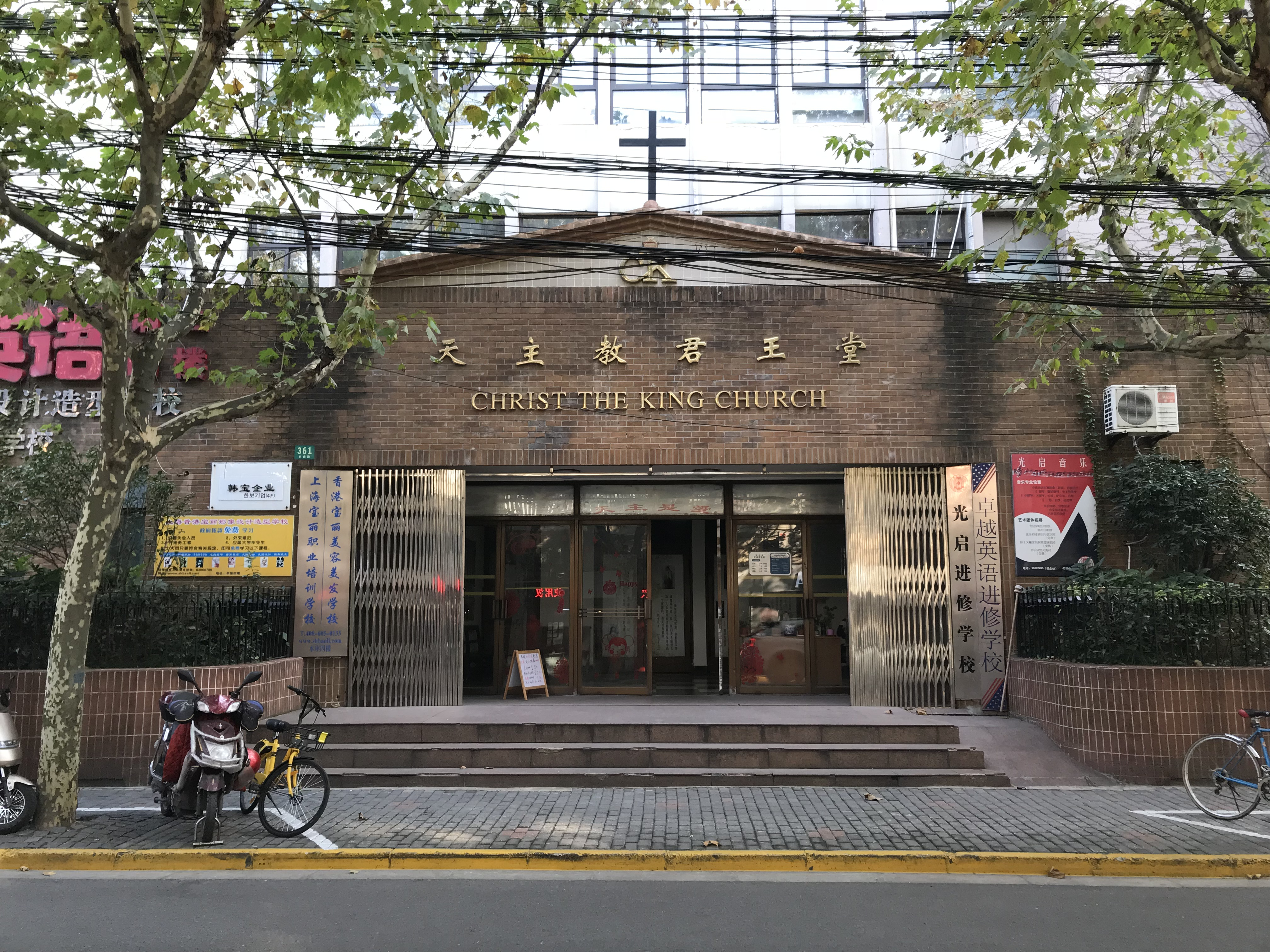 巨鹿路君王堂 巨鹿路361号